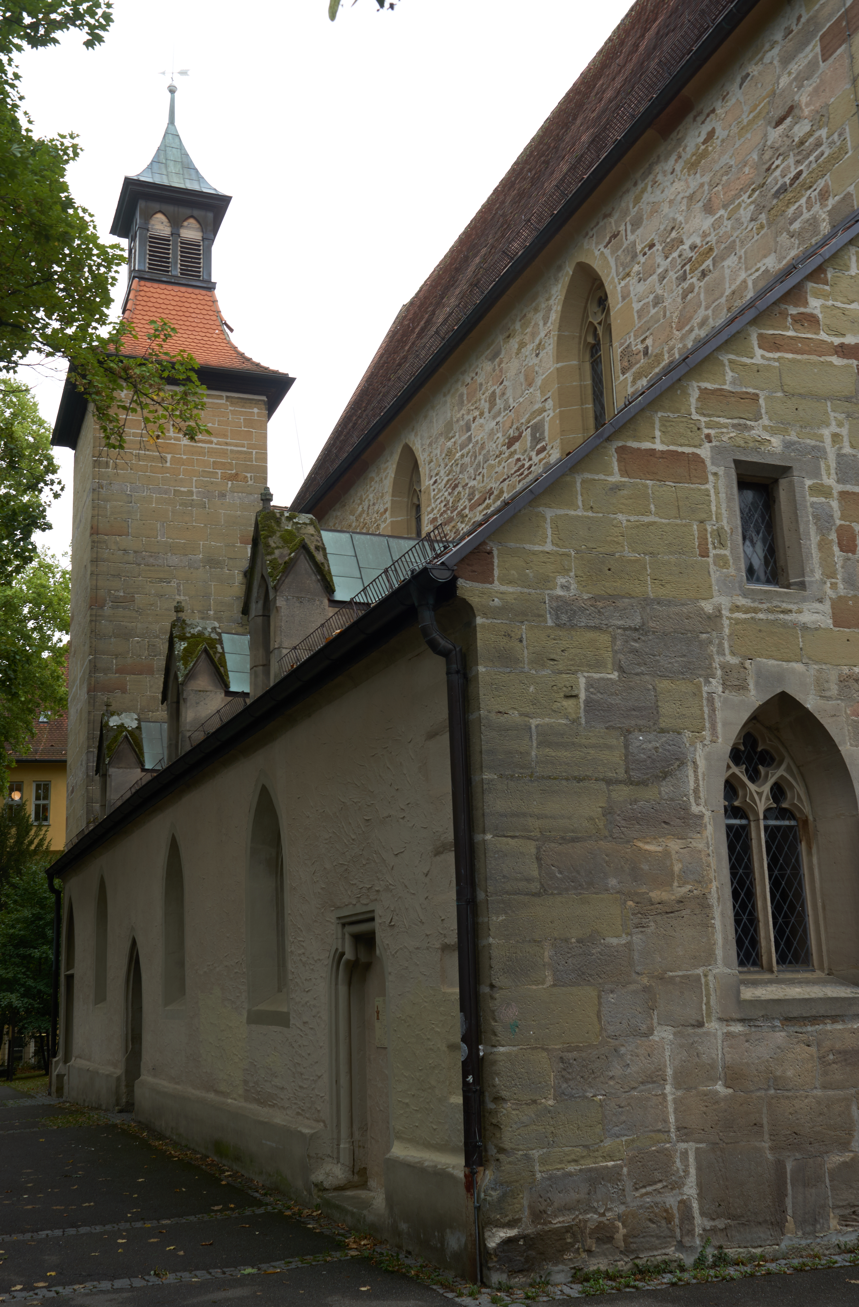 Evangelische Schlosskirche in Winnenden; Kulturdenkmal